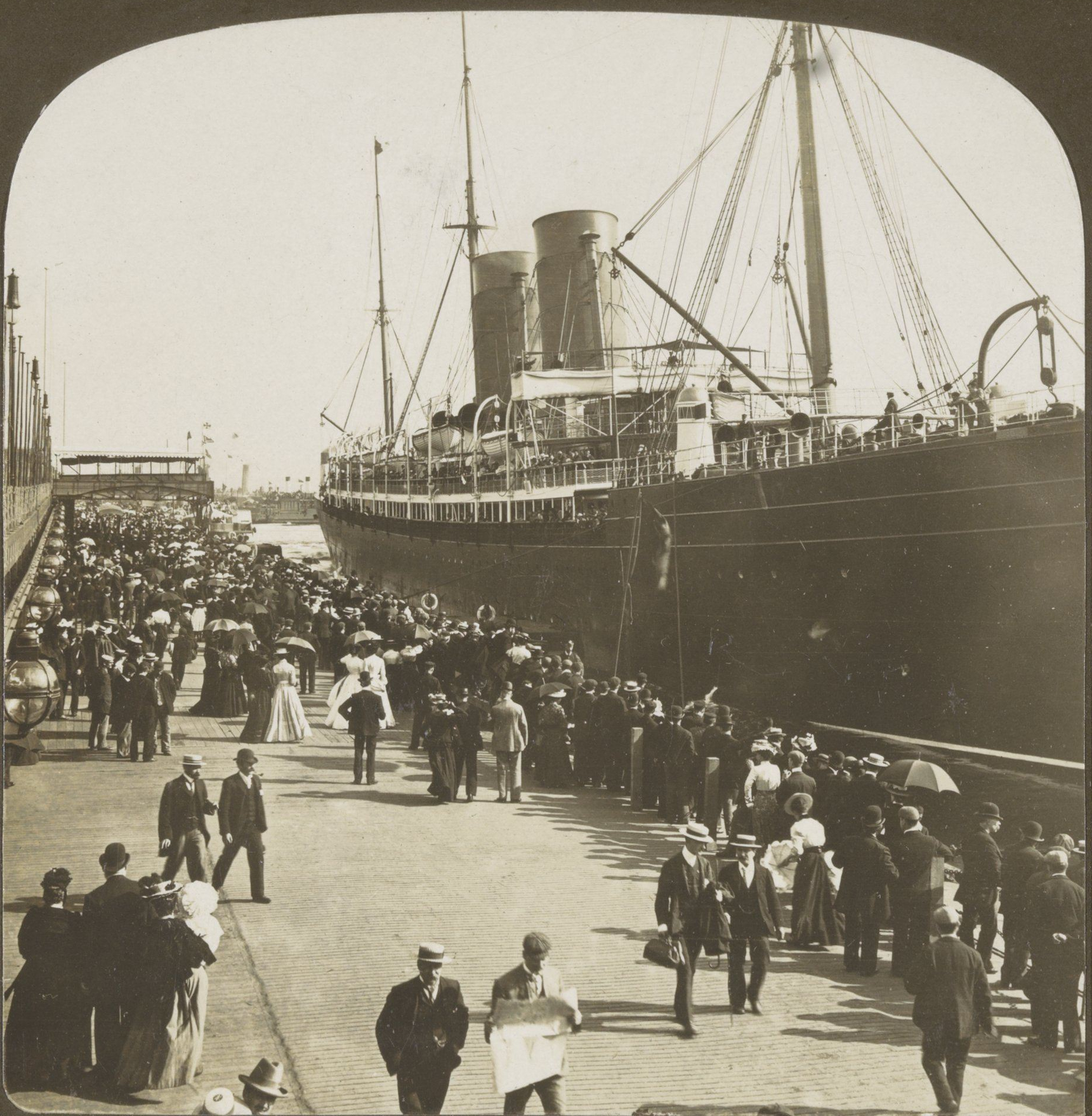 IdentificatieTitel(s): Stoomschip Umbria in de haven van LiverpoolThe Ocean Steamship Landing-stage, Liverpool, England,- Steamer Umbria departing for New York. (titel op object)Objecttype: stereofoto Objectnummer: RP-F-F07797Opschriften / Merken: nummer, recto, gedrukt: ‘2597’opschrift, recto, gedrukt: ‘The Perfec Stereograph. (Trade Mark. Patented April 14, 1903. Other Patents Pending.’opschrift, recto, gedrukt: ‘H.C. White Co., Gen'l Offices N. Bennington, Vt., U.S.A. Branch Offices: New York, Chicago, London.’opschrift, verso, gedrukt: ‘It is a pity that so many tourists hurry immediately (...) See Baedeker's Great Britain. Longfellow's Poem of Places.’VervaardigingVervaardiger: fotograaf: H.C. White (vermeld op object)uitgever: H.C. & Co. White (vermeld op object)Plaats vervaardiging: fotograaf: Liverpooluitgever: New YorkDatering: 1902Fysieke kenmerken: ontwikkelgelatinezilverdrukMateriaal: karton fotopapier Techniek: ontwikkelgelatinezilverdrukAfmetingen: secundaire drager: h 85 mm × b 170 mmOnderwerpWat: steamship, motorshipharbourWaar: LiverpoolVerwerving en rechtenVerwerving: overdracht van beheer 1994Copyright: Publiek domein